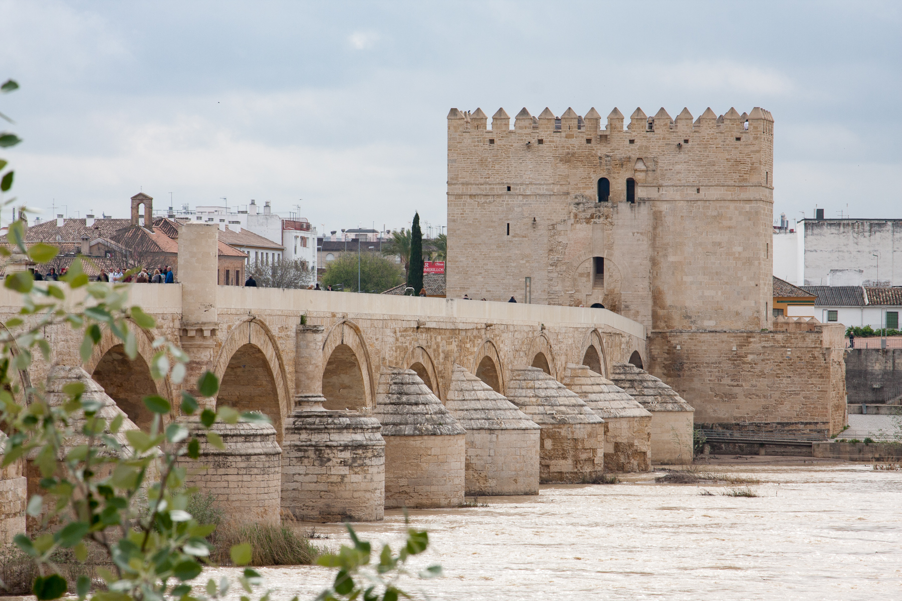 Puente romano de Córdoba (España).